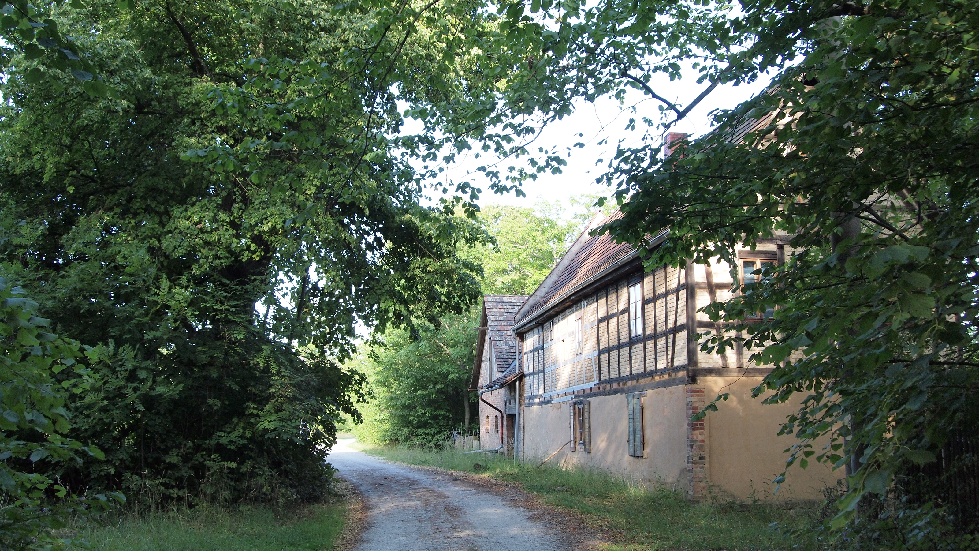 Hof und Sommerlinde vor dem ehemaligen Gasthof in der Siedlung Burgrabis, Ansicht vom Westen